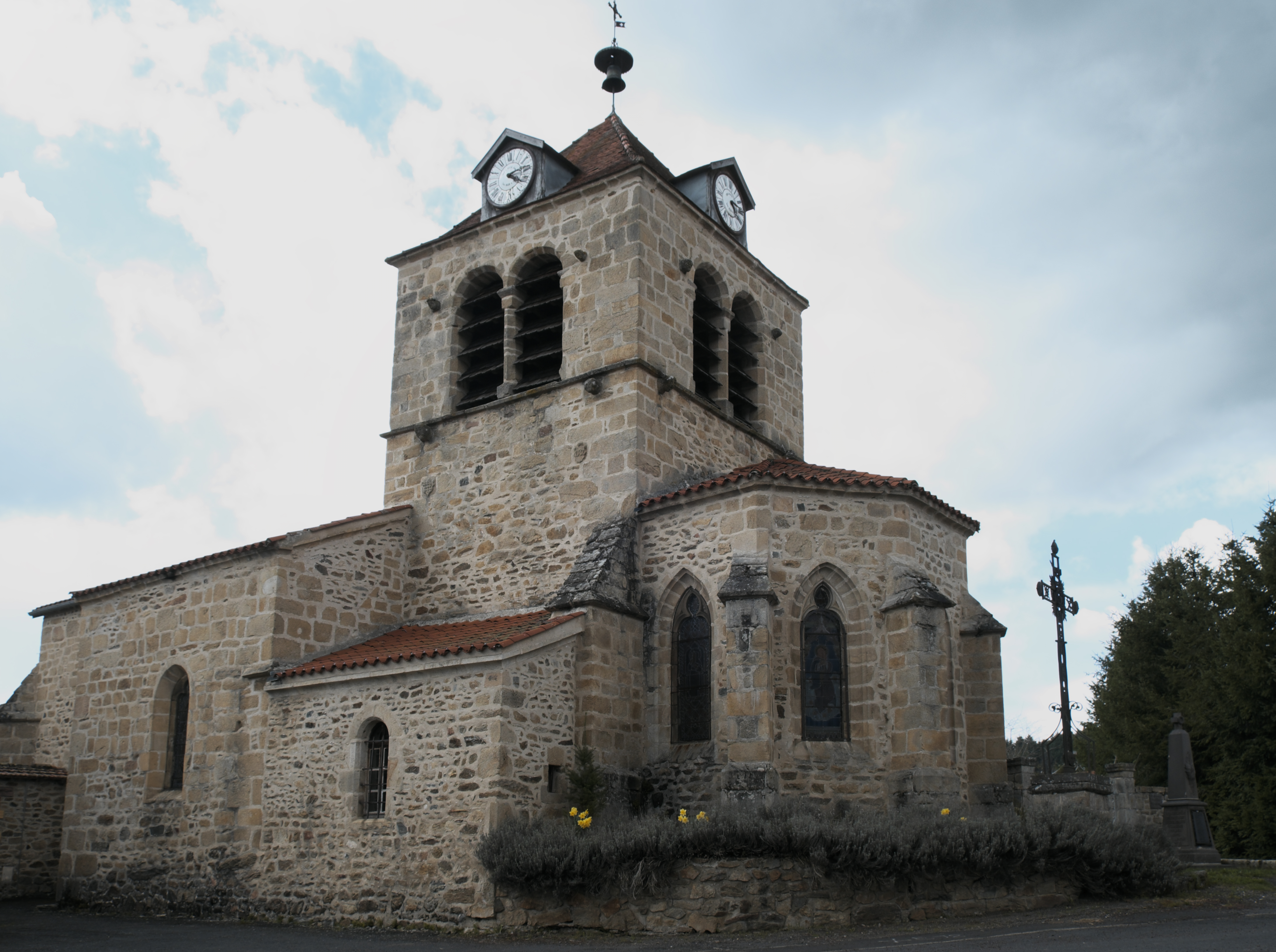 Katholische Kirche Notre-Dame de l'Assomption in Laval-sur-Doulon im Département Haute-Loire (Auvergne-Rhône-Alpes/Frankreich)